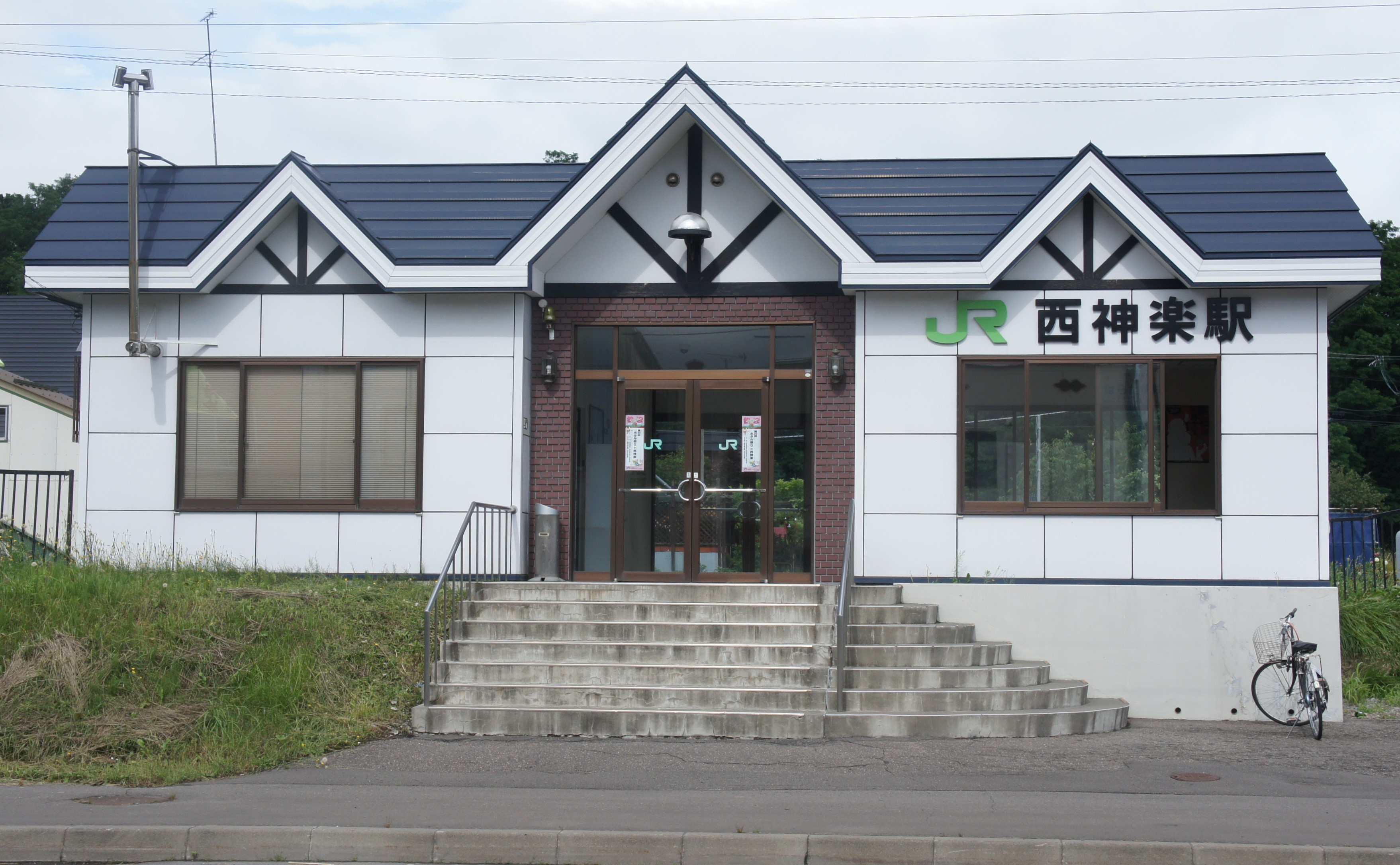 JR富良野線・西神楽駅の駅舎